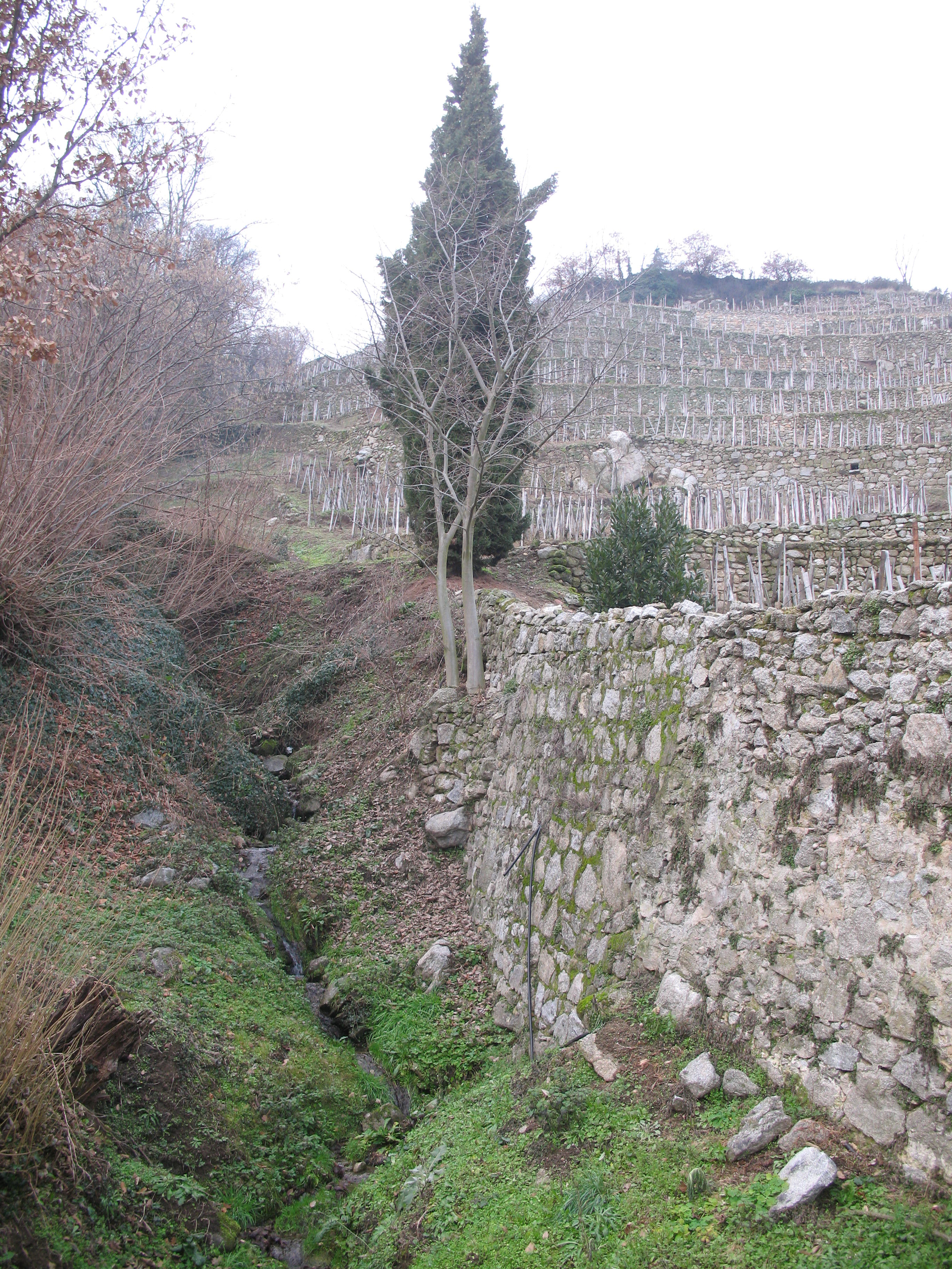 Château-Grillet à Vérin dans la Loire.